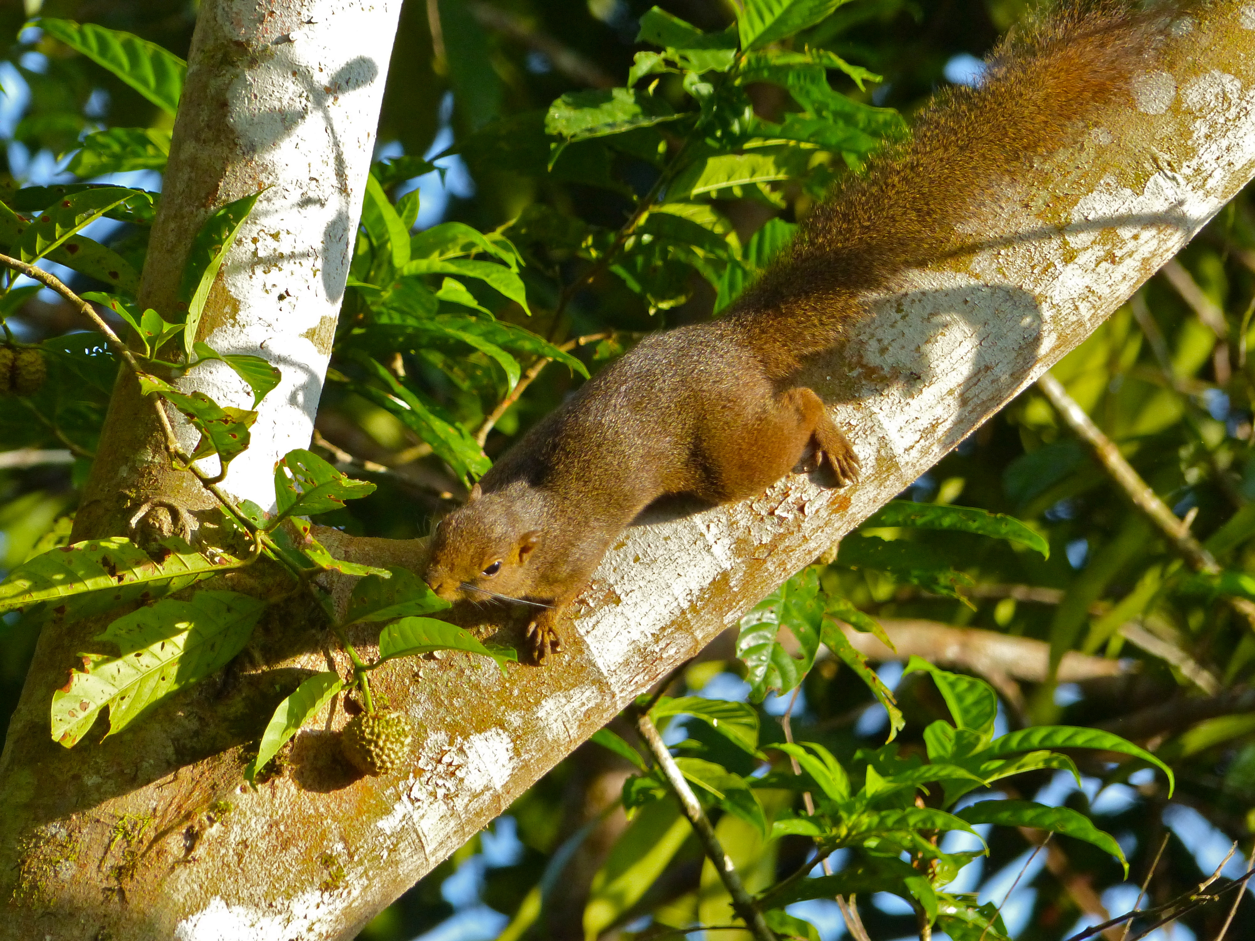 Mulu Headquarters, Mulu NP, Sarawak, MALAYSIA